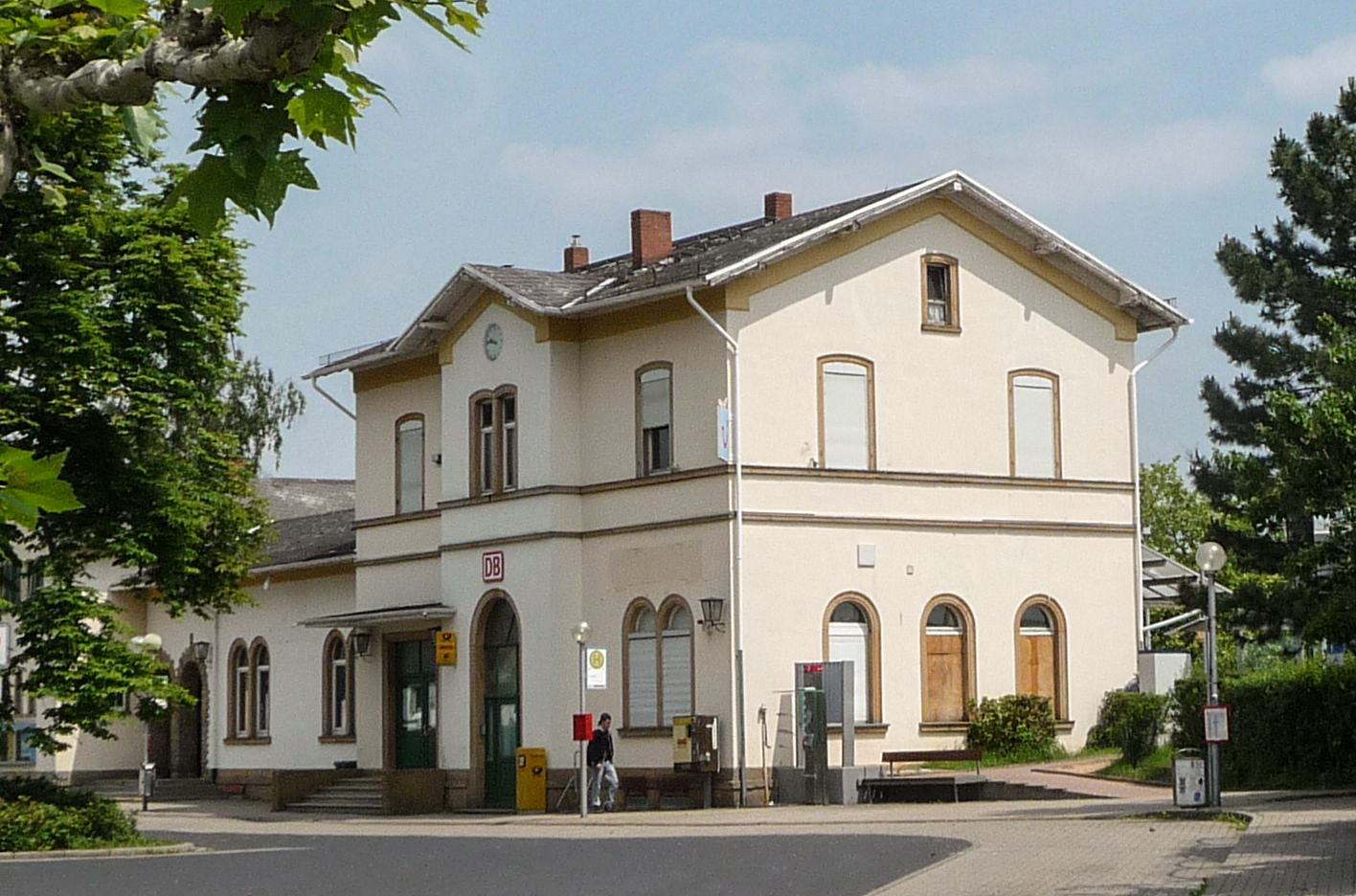 Hauptbahnhof